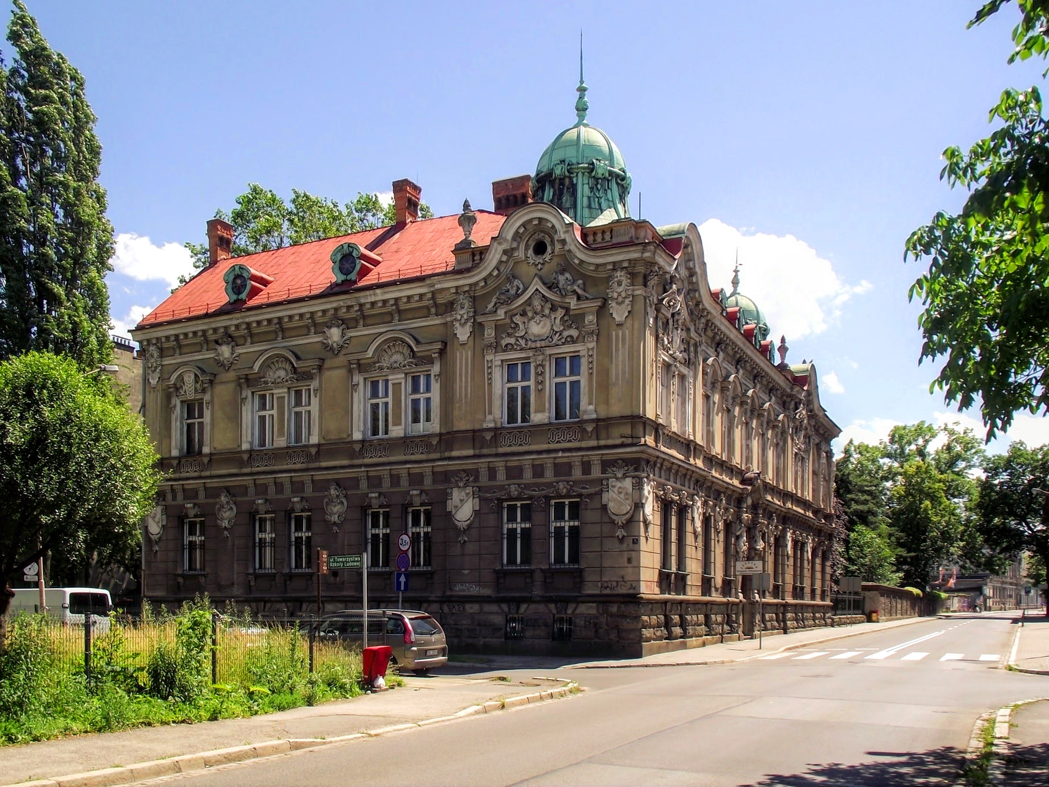 Willa Rosta w Bielsku-Białej.